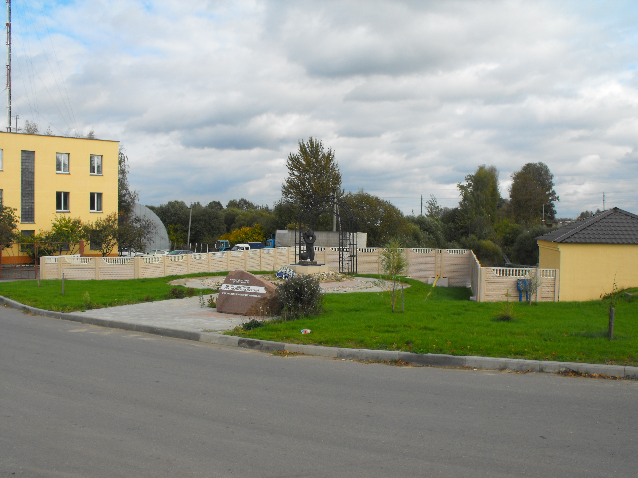 Мемориальный комплекс на месте убийства нацистами около 10000 витебских еврее - узников гетто около бывшей пригородной деревни Себяхи в Иловском (Туловском) рву. Находится слева от дороги на выезде из Витебска с улицы Лазо (в сторону деревни Тулово). Установлен 25 июня 2010 года.